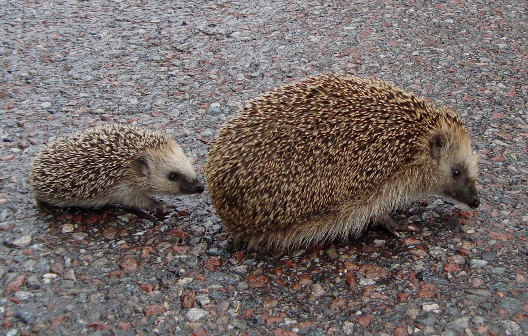 Erinaceus europaeus